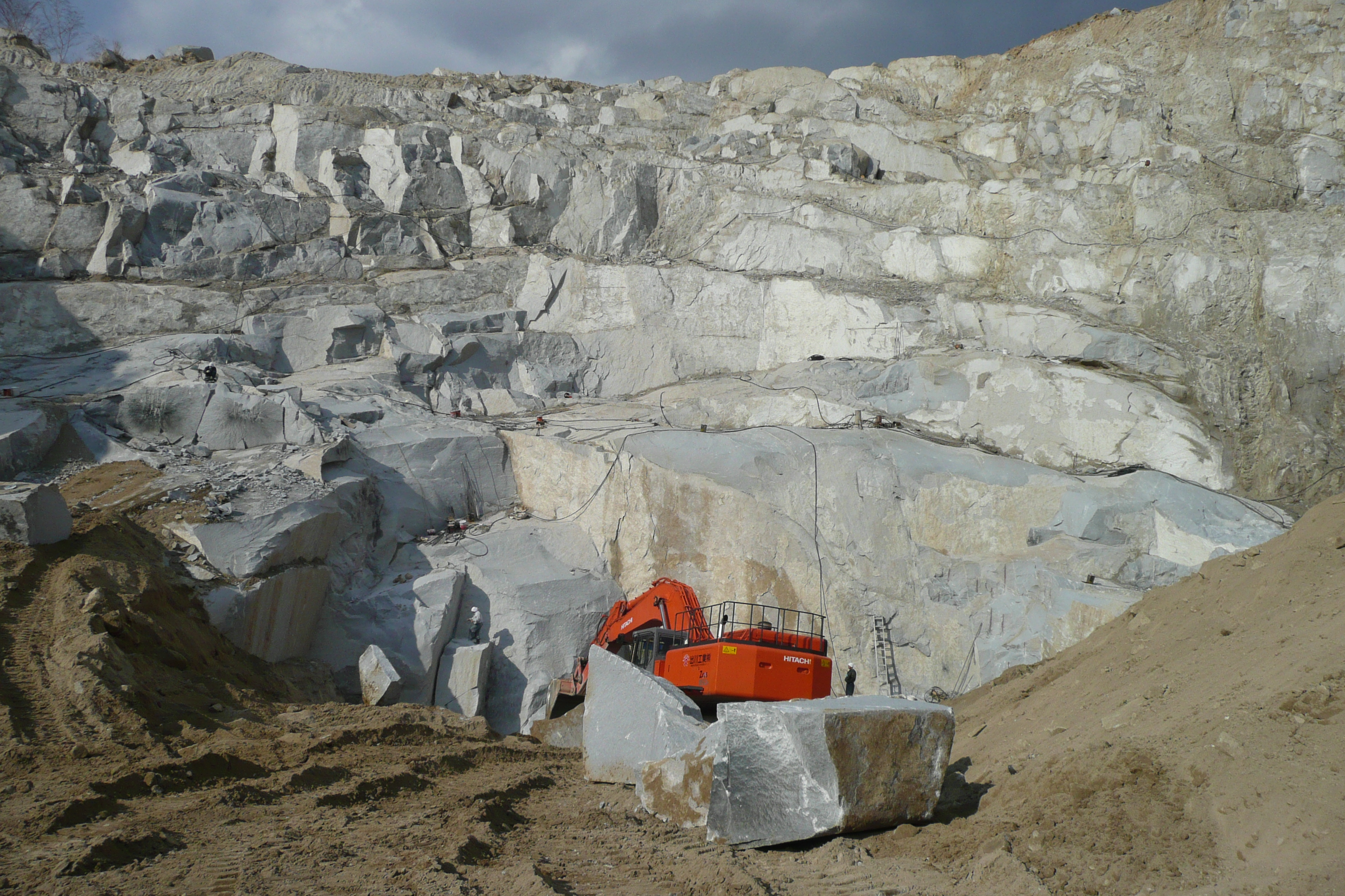 出川工業（株）採石場